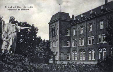 Pensionaat behorend bij het Sint-Elisabethklooster in Heythuysen, Limburg, ca. 1910-1913. Het klooster is het moederhuis van de Congregatie van de Zusters Franciscanessen van Heythuysen. Fotocollectie RHCL Maastricht, collectie Dr. J.W.H. Goossens, nr: CG 500-075.